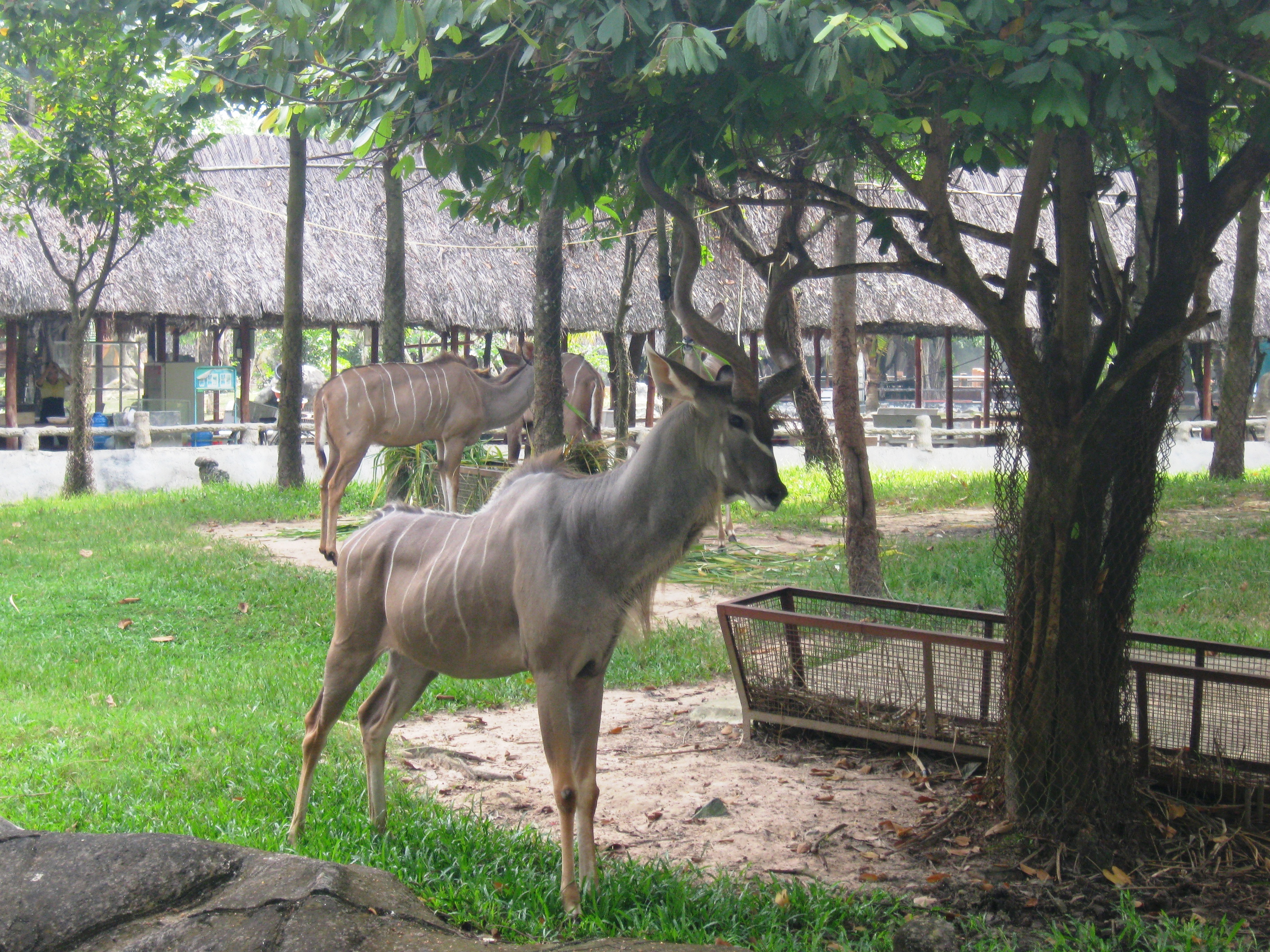 Linh dương sừng xoắn (greate kudu - traghelaplus strepsiceros) thường sống ở Nam Châu Phi. Hiện con vật được nuôi trong khu Lạc Cảnh Đại Nam Văn Hiến (Bình Dương, Việt Nam).